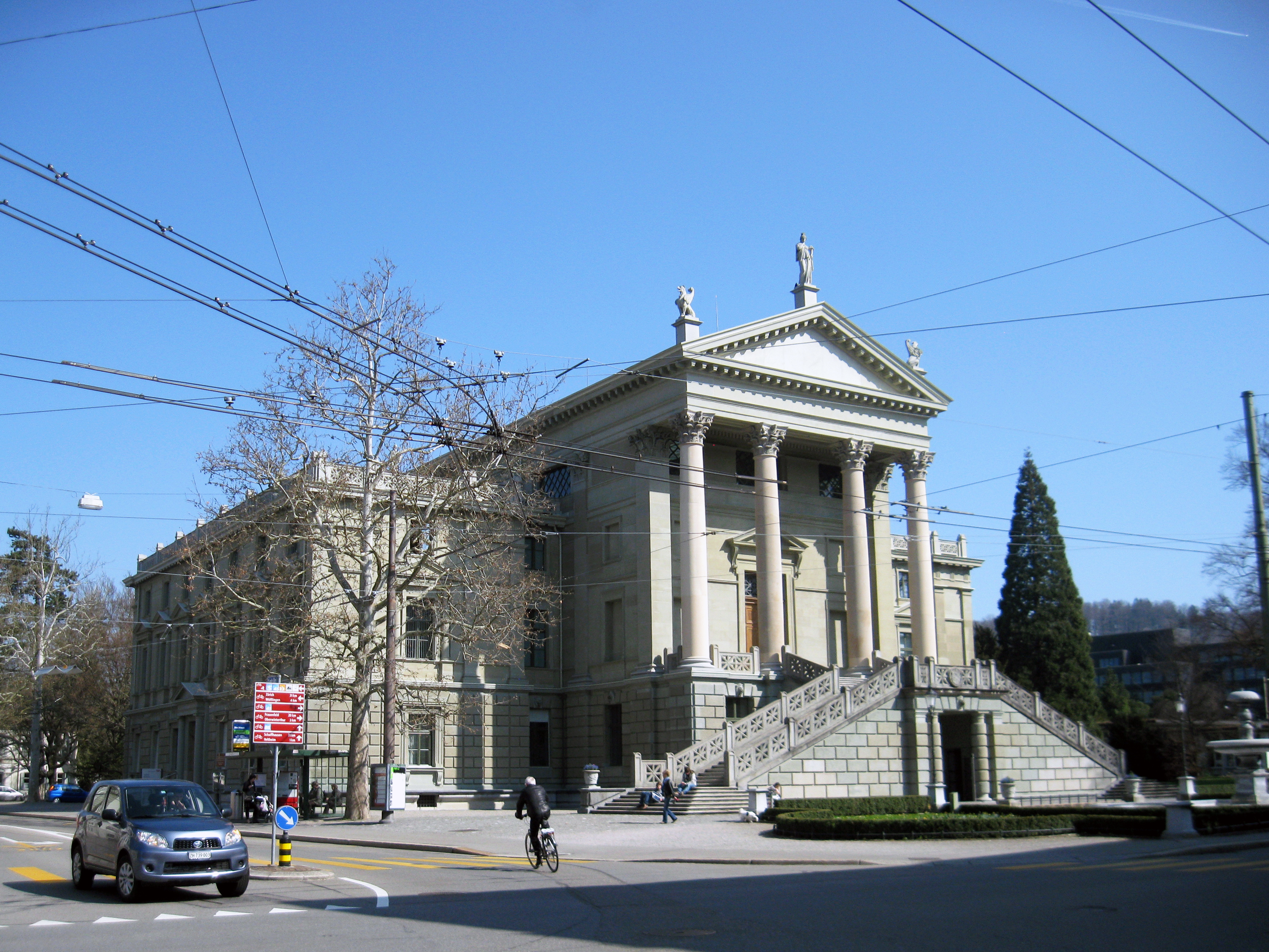 Stadthaus sowie Stadtarchiv Winterthur, Schweiz